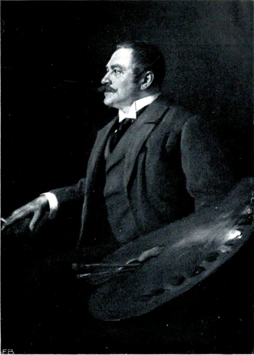 Portrait de Caspar Ritter